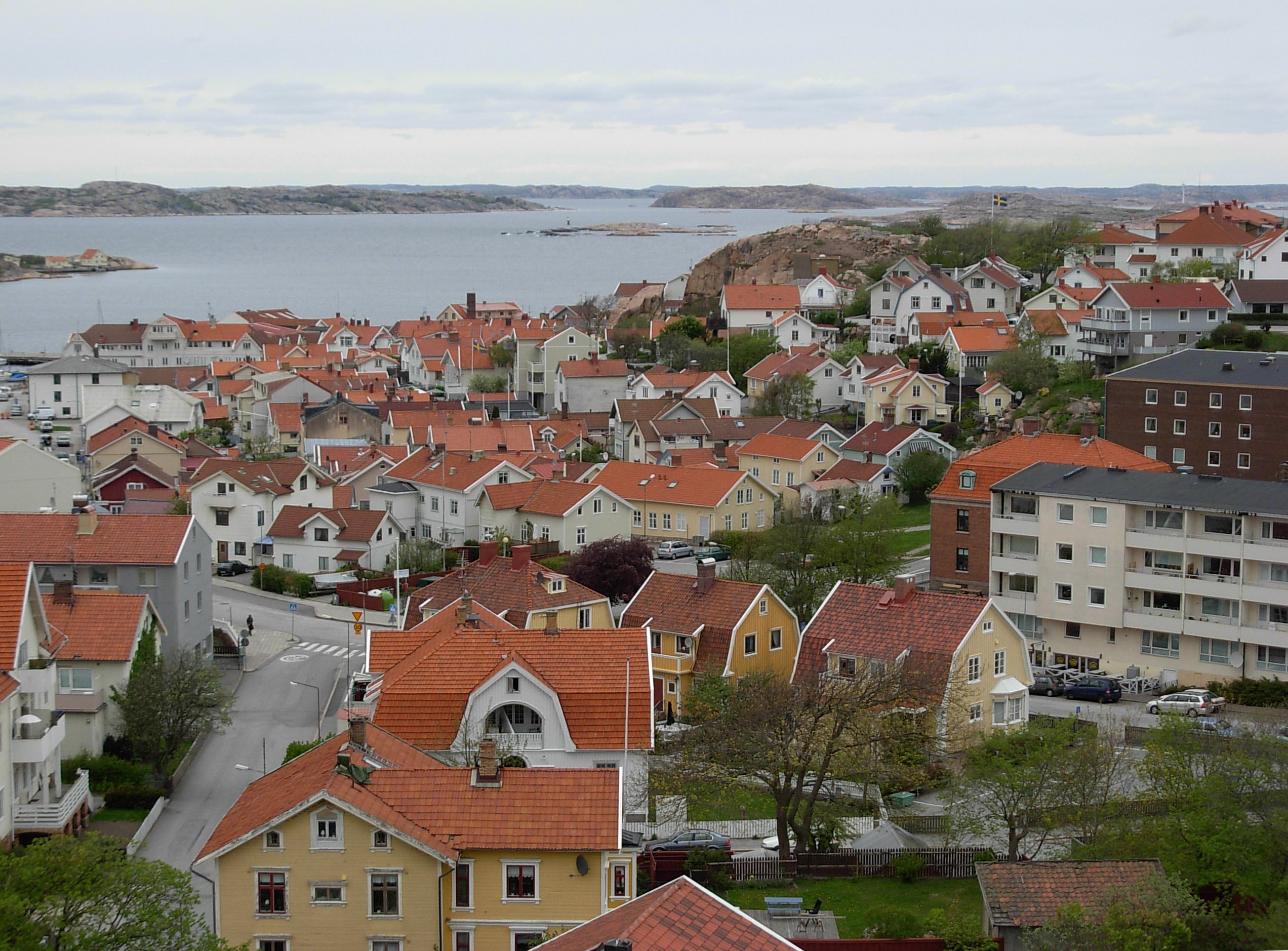 Lysekil, fishing town in Bohuslän.